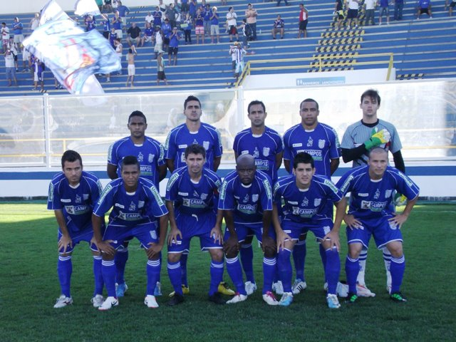 Goytacaz na série b carioca em 2012